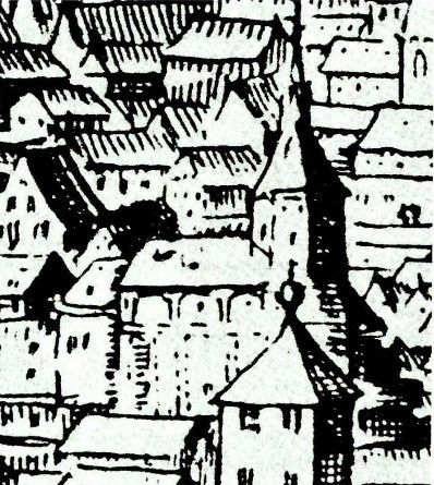 Hagenau von Süden, Stich von van der Heyden 1622, Ausschnitt mit der Pfalzkapelle